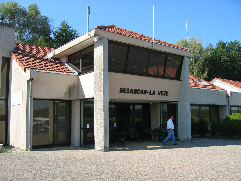 Aéroport de Besançon-La Vèze